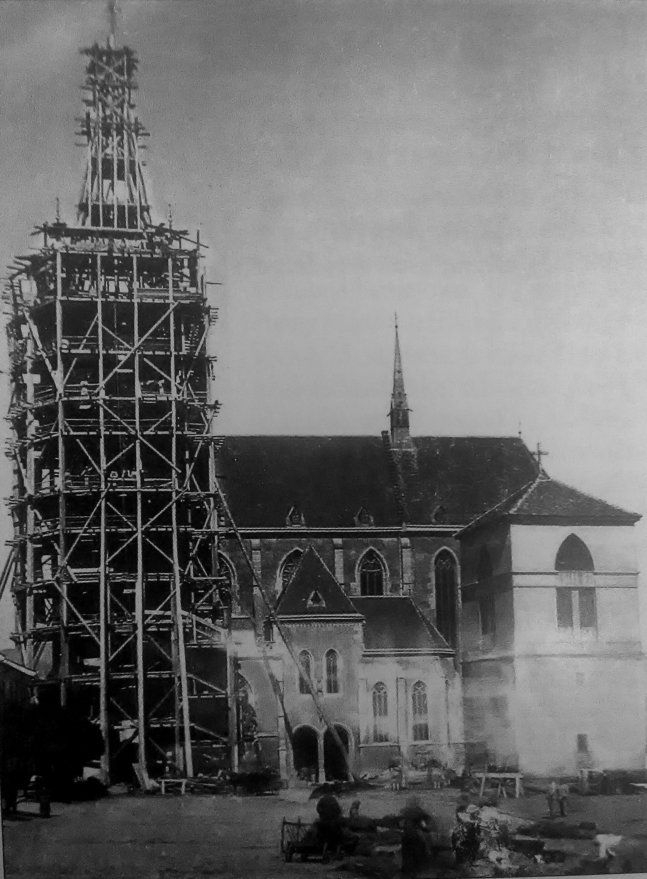 Construction of tower